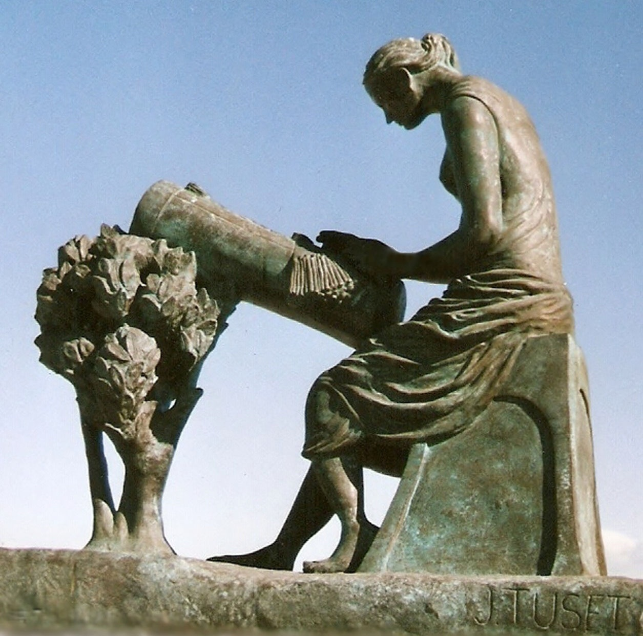 Monument a la Puntaire de l'Arboç, obra en bronze creada l'any 2005 per l'escultor i pintor català Joan Tuset.Esta situada en una de les rotondes de la N-340 a l'entrada de l'Arboç.